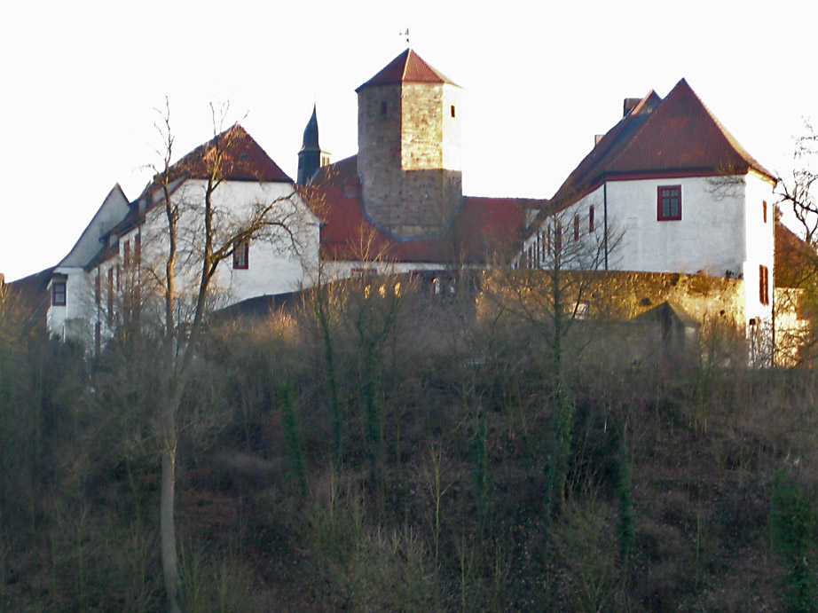 Schloss und Benediktinerabtei Iburg, Ansicht vom Charlottenburger Ring auf die Schlossflügel und den so genannten Bennoturm